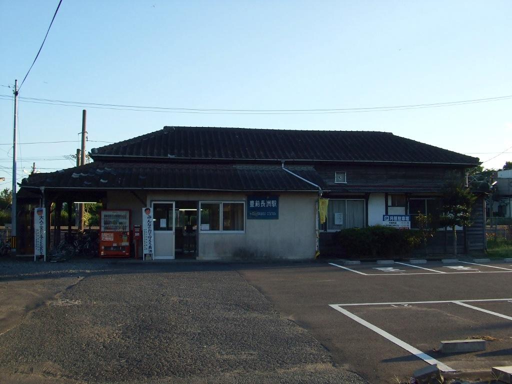 豊前長洲駅舎（2007年8月15日撮影）